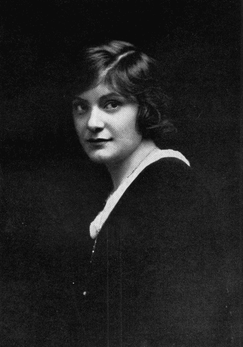 Ann Murdock